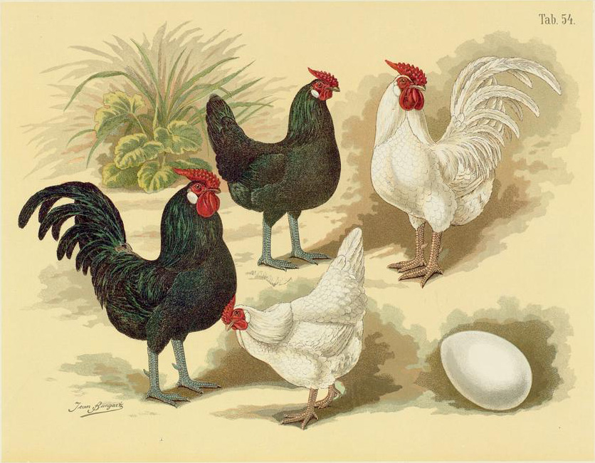 Bantam (rosenkämmig). Gallus dom. nanus bantamensis. Bantams. Bantam.